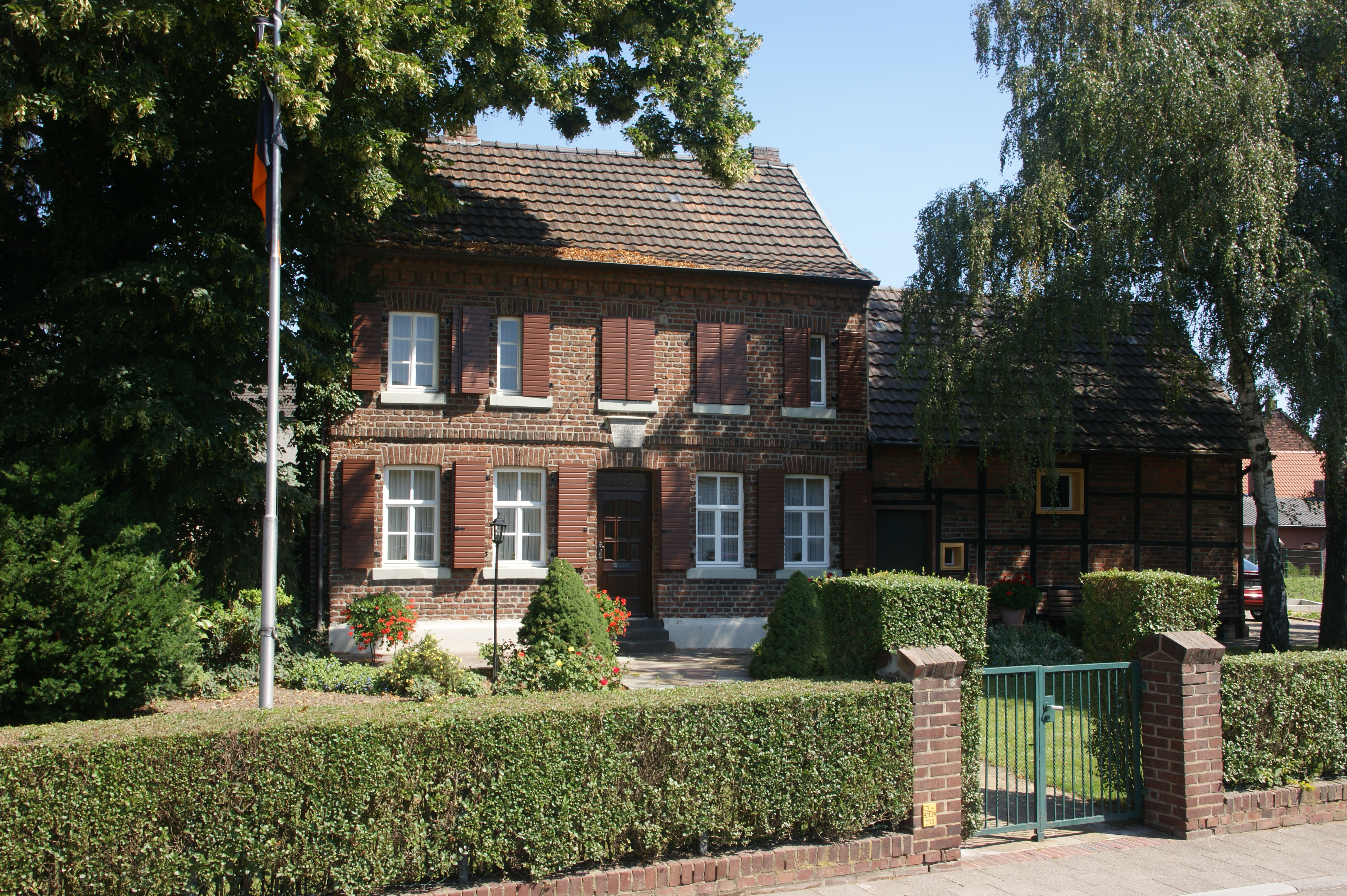 Das sogenannte Geburtshaus von Adolph Kolping in Kerpen, Kolpingstraße